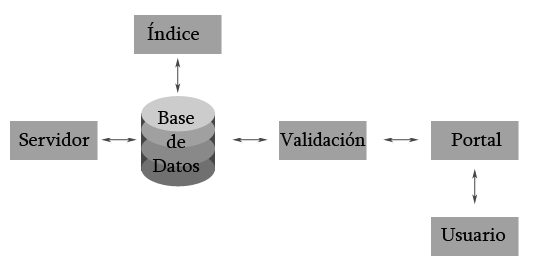 Diagrama de bloques del funcionamineto de un Servicio de Música Online